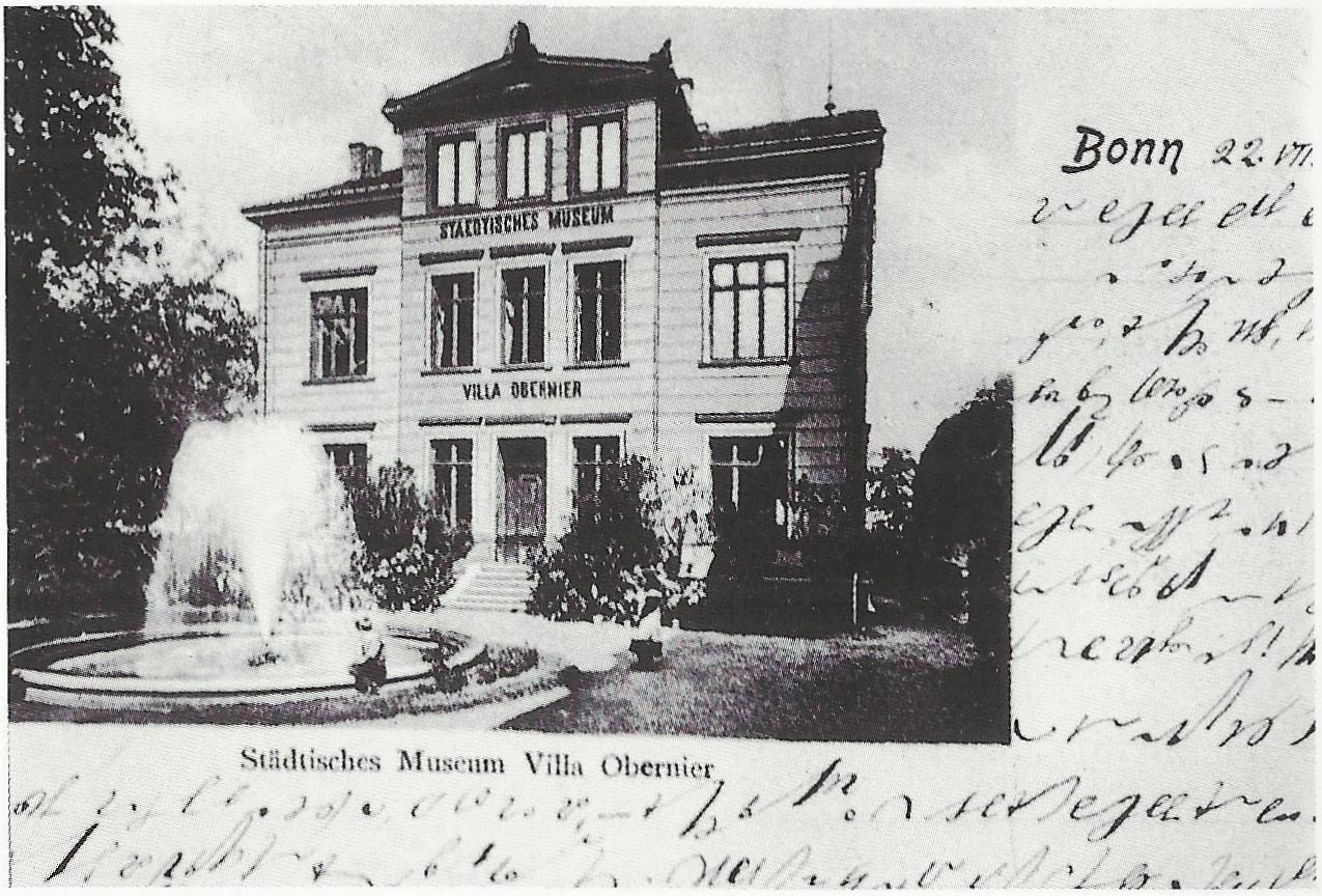 Villa Blume/Obernier (erbaut 1849–51, im Zweiten Weltkrieg zerstört), Coblenzerstraße 9, Bonn: Aufnahme der Villa als städtisches Kunstmuseum vor Errichtung eines Ausstellungssaals im Jahre 1904